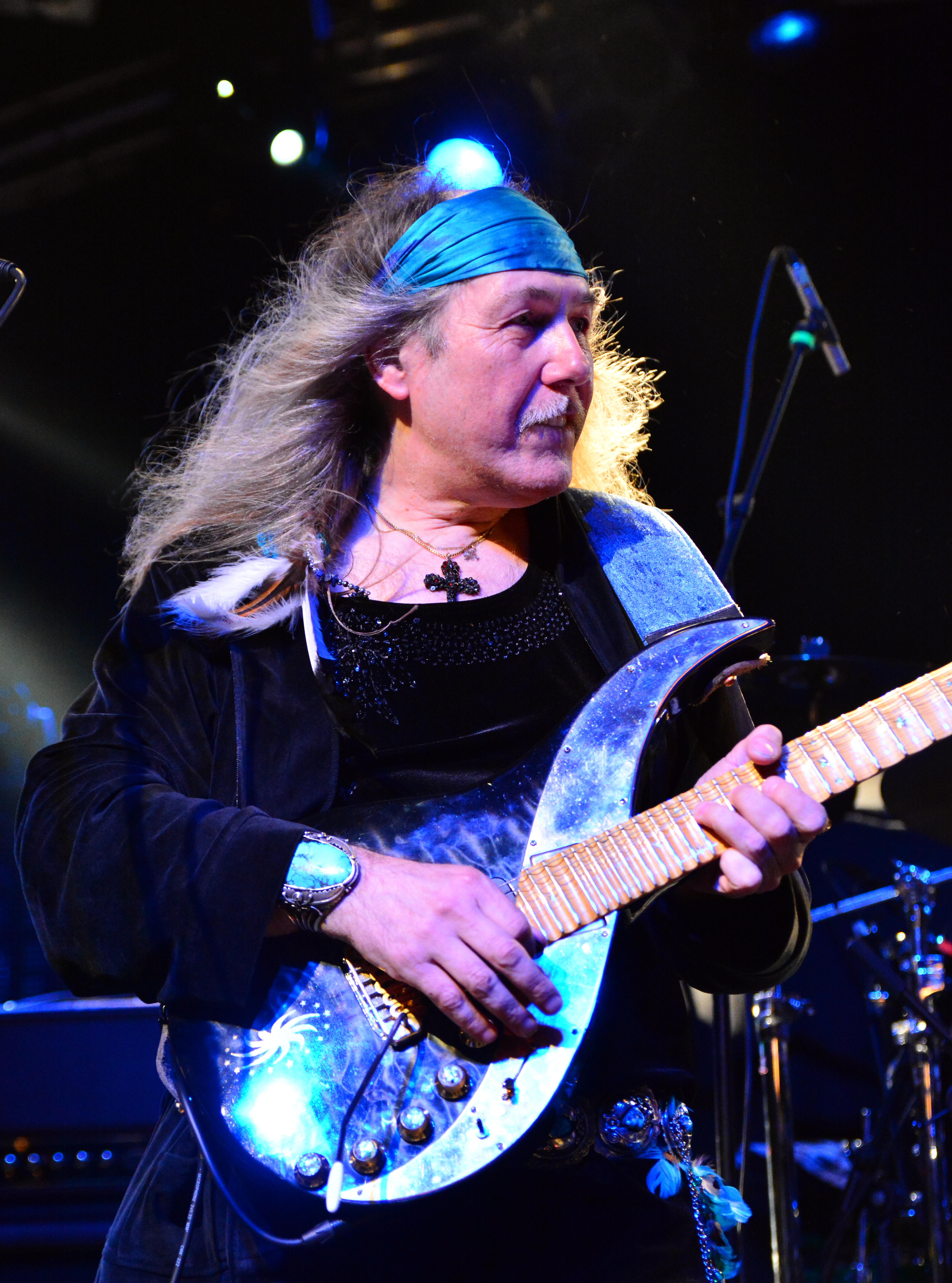 Uli Jon Roth bei den Hamburg Metal Dayz 2015